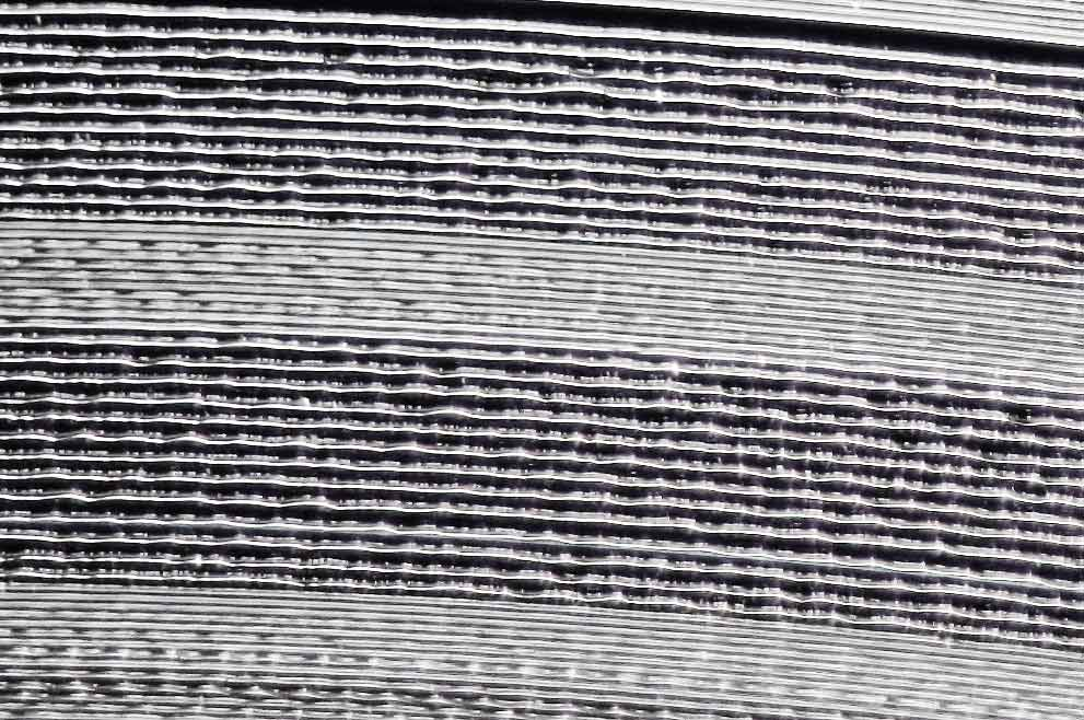 Ukázka drážek se záznamem hudby na dlouhohrající gramofonové desce.